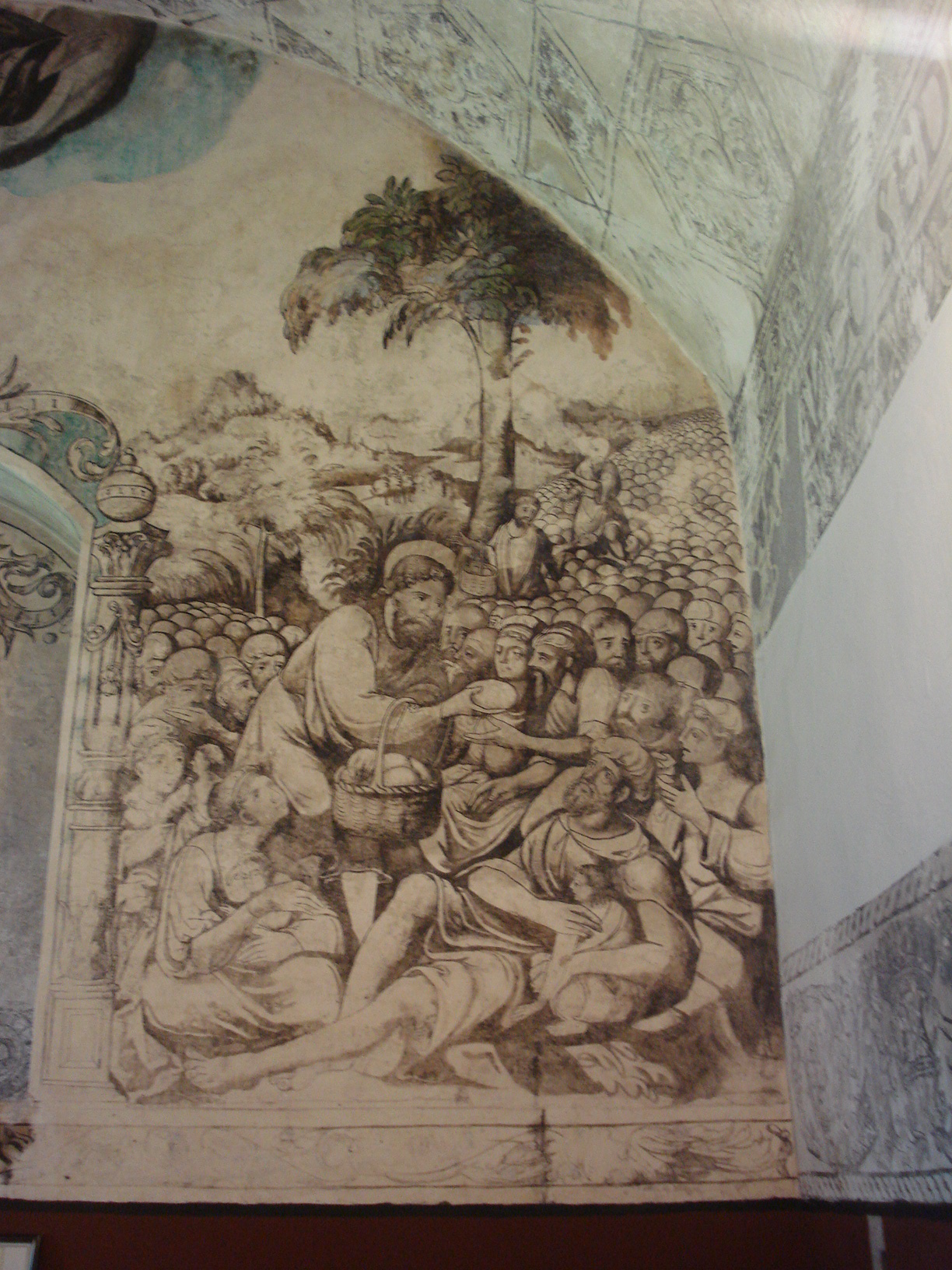 Santo Domingo de German, Oaxtepec, Morelos, Mexico